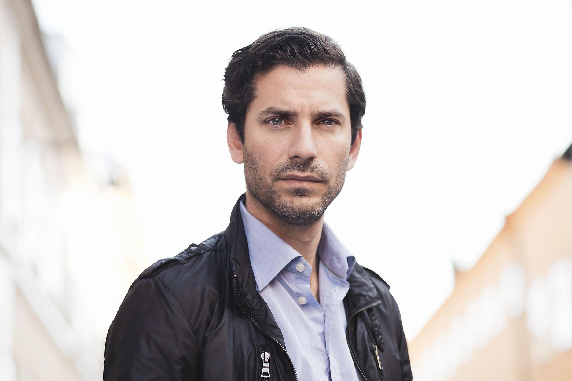 Advokaten och författaren Jens Lapidus.